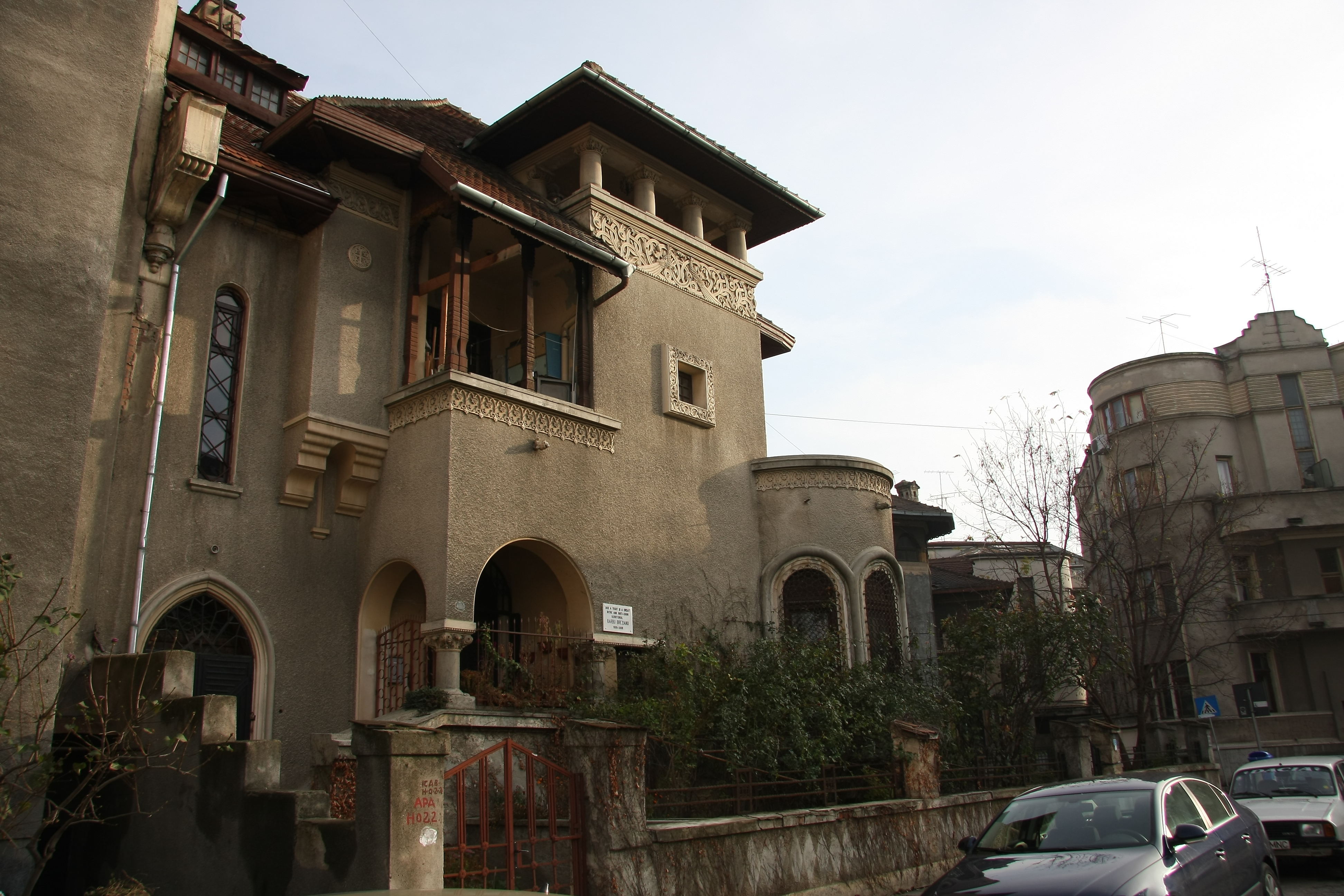 Casa unde a trăit scriitorul Mircea Eliade între 1934-1940